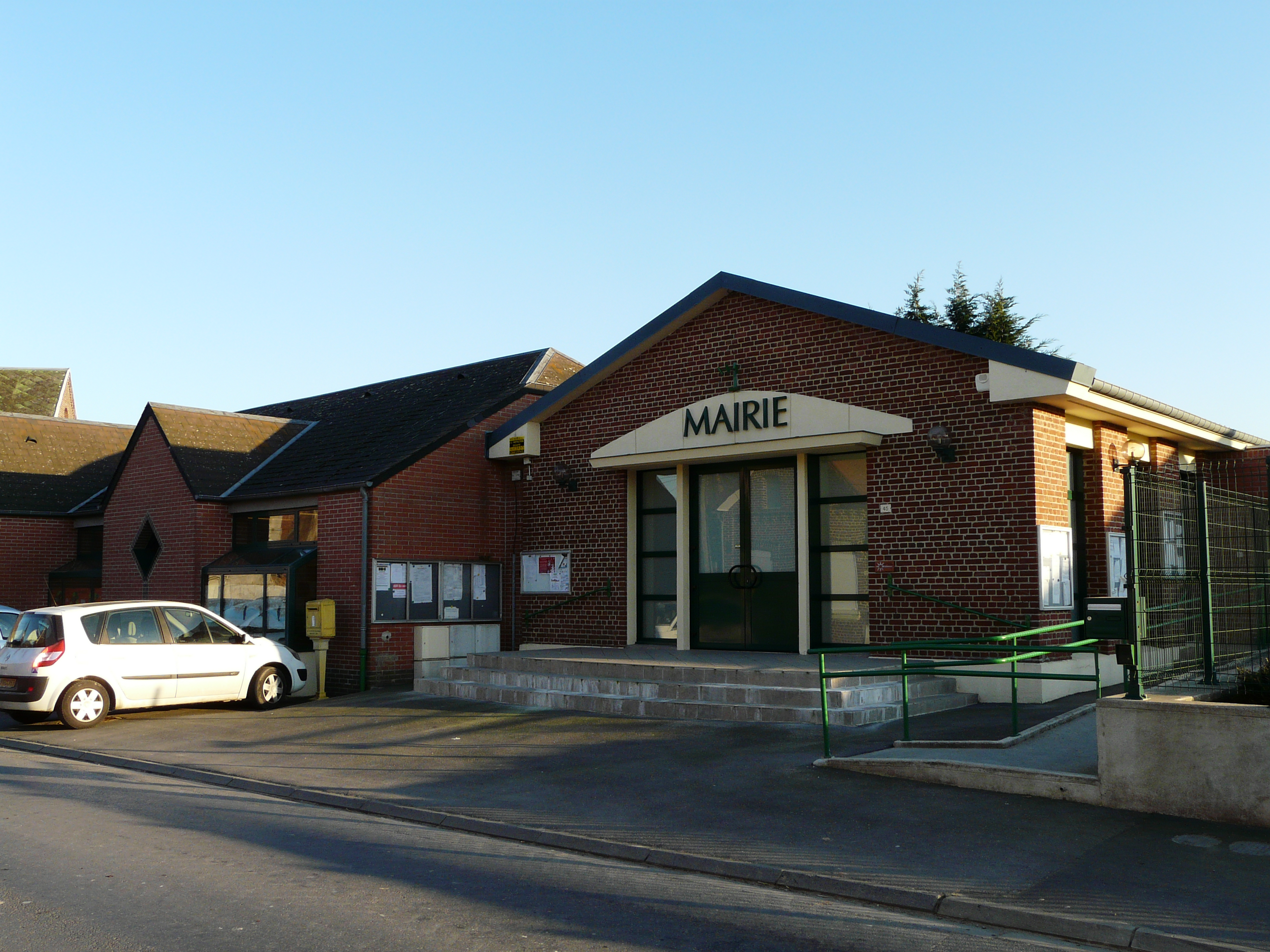 La mairie d'Haynecourt